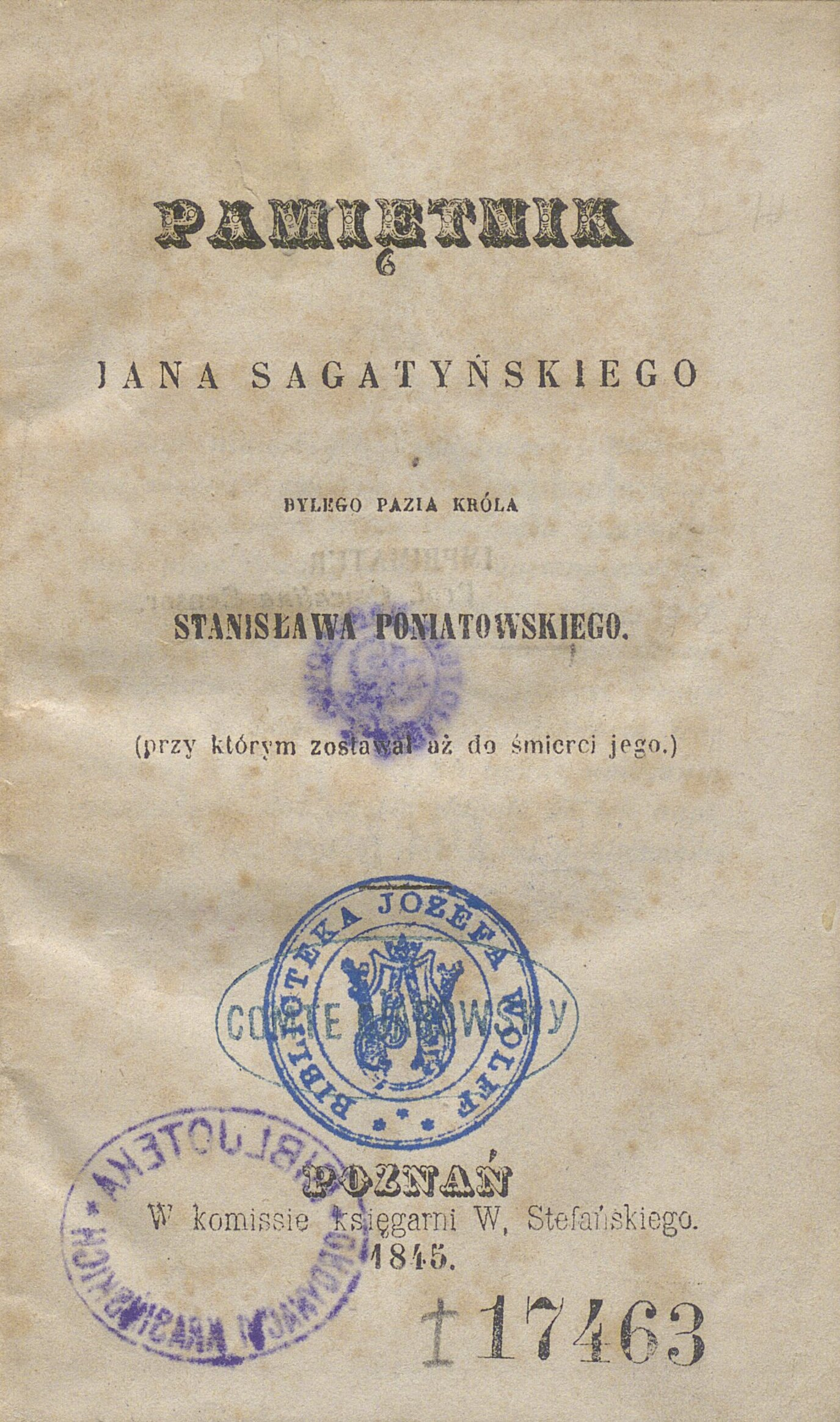 [4], 94 s. : err. ; 16 cm